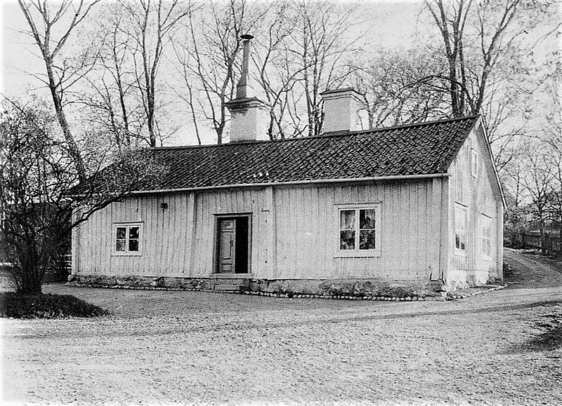 Guldsmedstorpet (även benämnt Färjkarlstorpet, Färjartorpet, Ulvsunda färjetorp, senare Traneberg), Traneberg, Bromma, Stockholm. Torpet hörde till Ulvsunda säteri och var byggt omkring år 1700, det revs 1937. Foto från 1928.